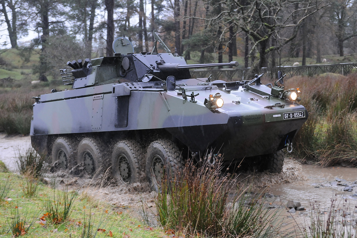 MOWAG